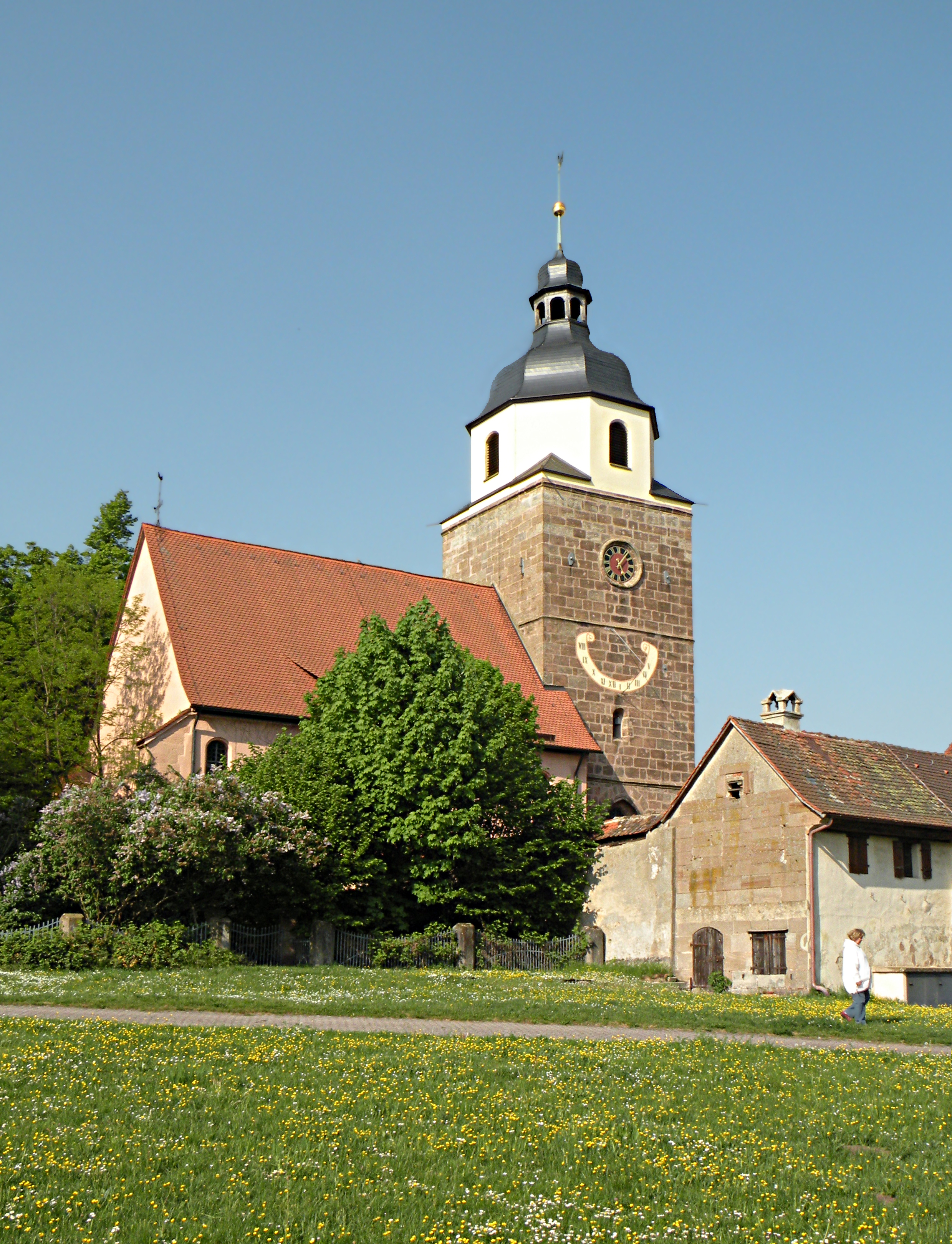 Grossgruendlach._St._Laurentius_Kirche